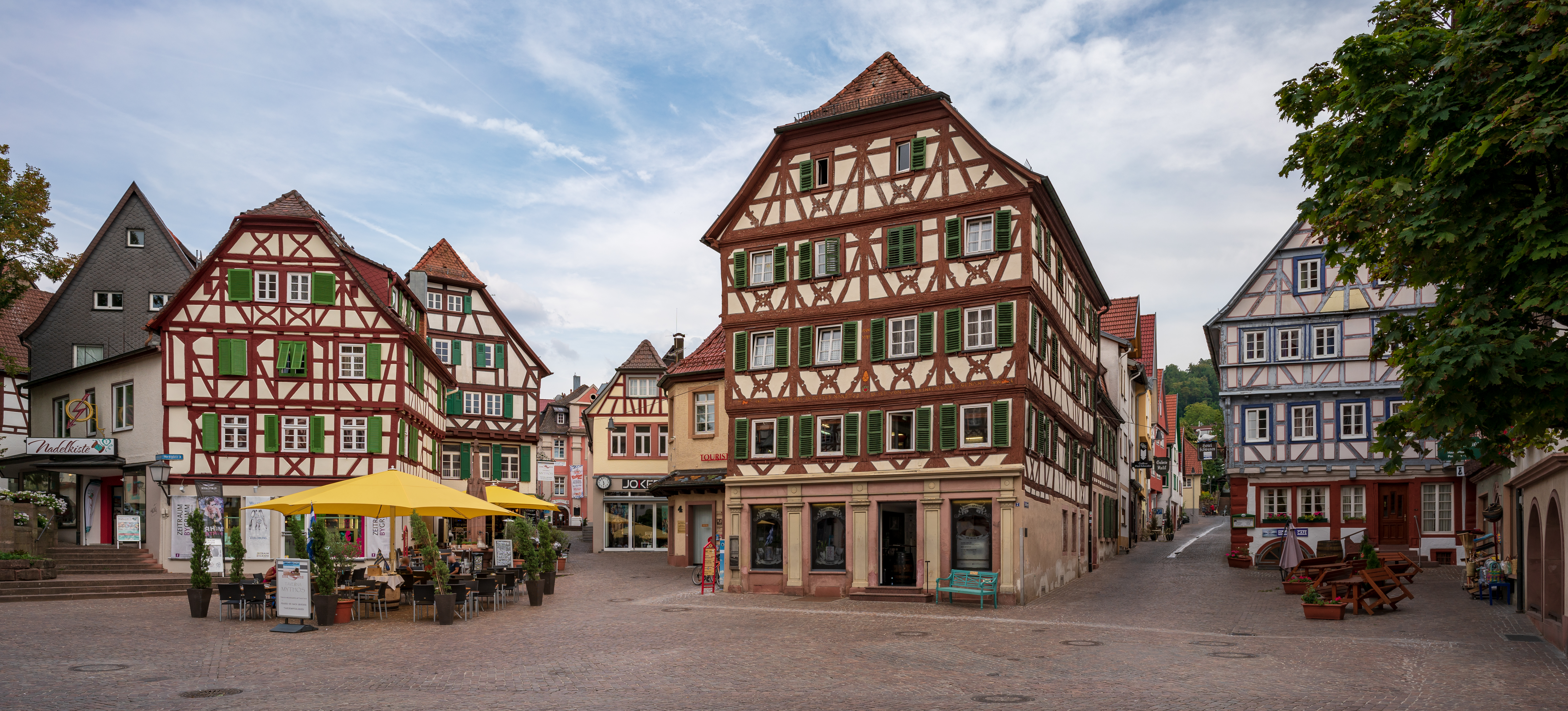 Mosbach (Neckar-Odenwald-Kreis): Vom malerischen Marktplatz gehen zahlreiche Gassen ab, deren Staffelung an eine Theaterkulisse erinnert. Hier die Südostseite mit Blick in die Badgasse (links) und in die Schlossgasse (rechts). Die denkmalgeschützten Fachwerkhäuse sind (von links nach rechts) der ehemalige Rosenberger Hof (Marktplatz 1), zwischen den Gassen das Haus Lindenlaub (Marktplatz 1) und rechts zurückversetzt das Gasthaus Zum Schwanen (Schlossgassse 8).